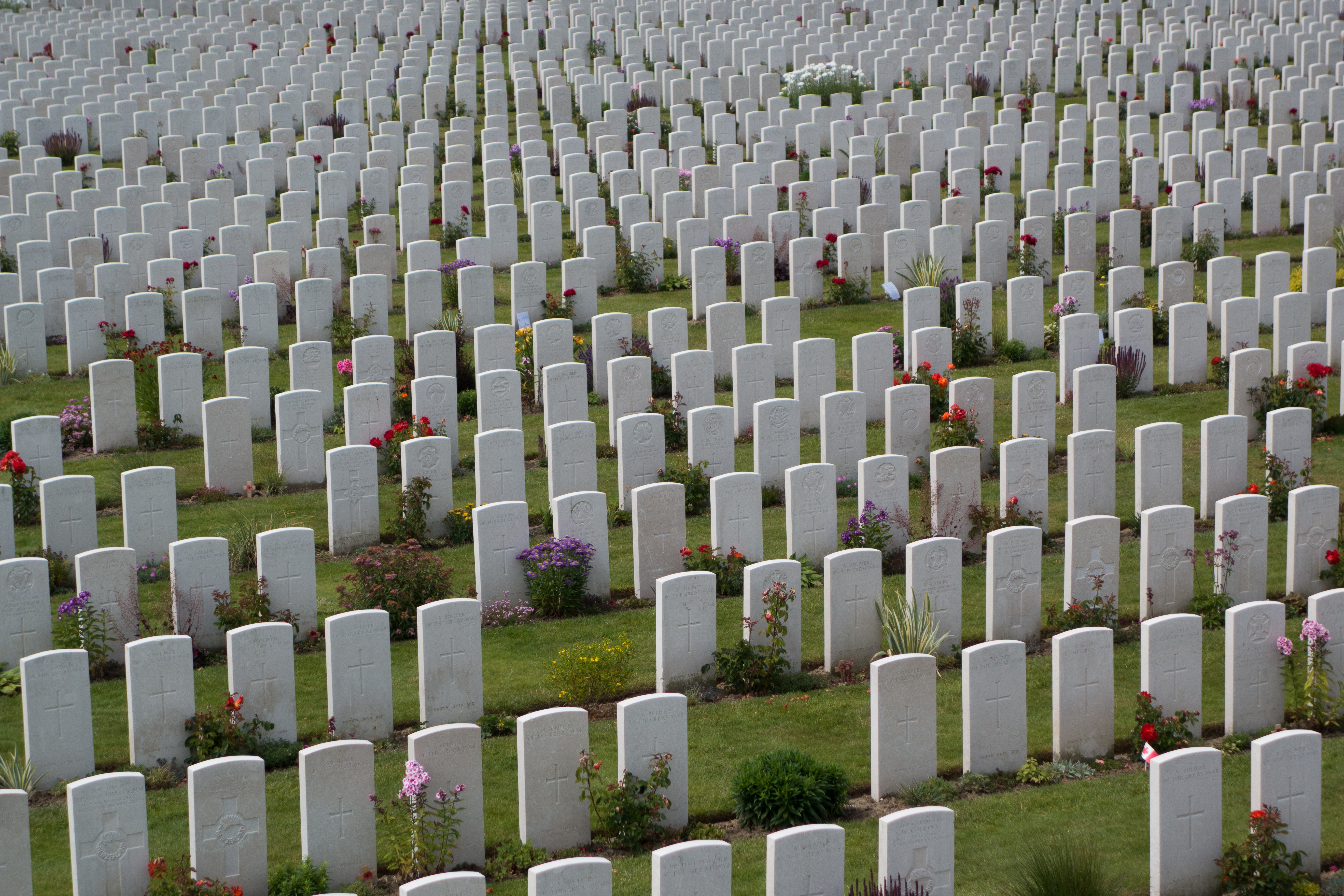 Belgium